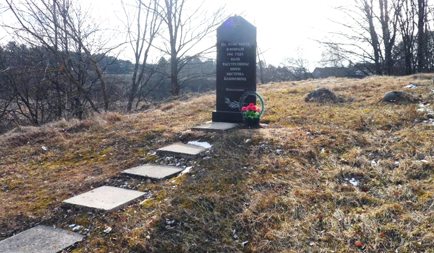 Памятник евреям, убитым во время Холокоста в местечке Бабиновичи Лиозненского района.